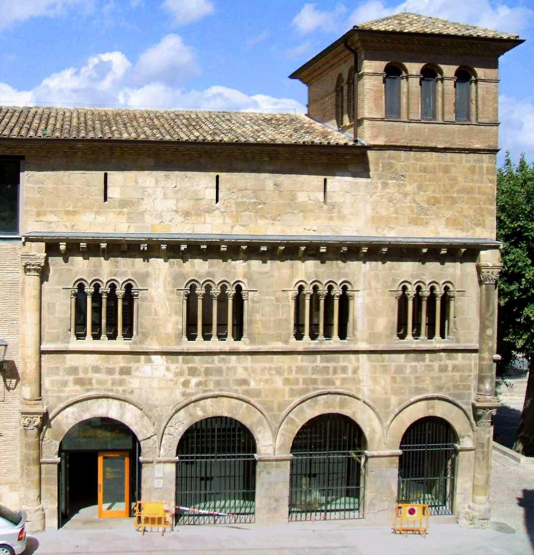 Palacio de los Reyes de Navarra, Estella (Navarra)